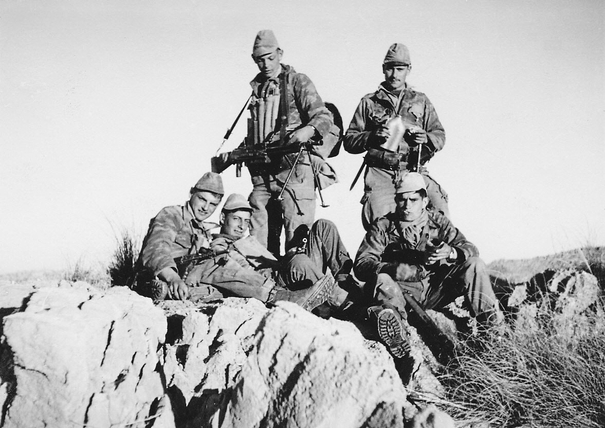 Secteur de M'Sila Section de commando de chasse V66 du 4me Zouaves en "crapahut" (équipement: FM 24-29 & PM MAT-49)